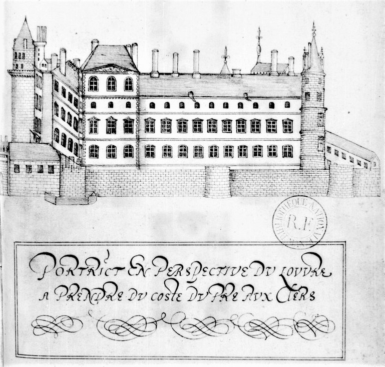 Palais du Louvre vu depuis le pré aux clers - Manuscrit français 9152 : « Recherches de plusieurs singularités, par Françoys MERLIN, controlleur général de la maison de feu madame Marie-Élizabeth, fille unique de feu roy Charles dernier,... portraictes et escrites par Jacques Cellier, demourant à Reims. » (1583-1587)